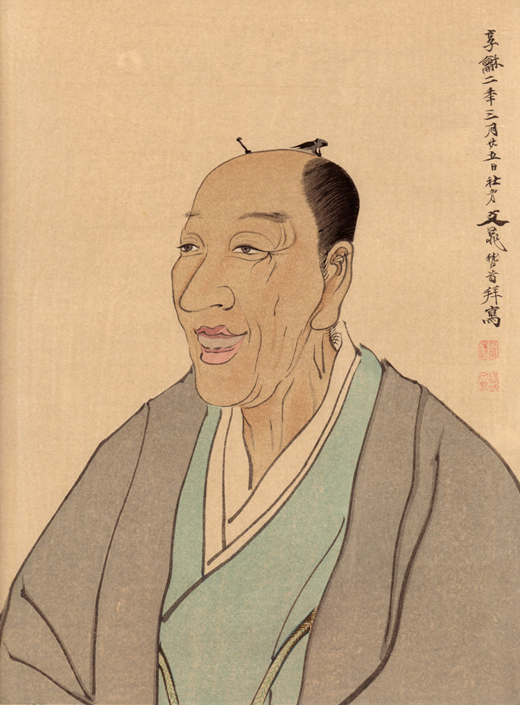 A portrait of Kimura Kenkadoh 木村蒹葭堂像